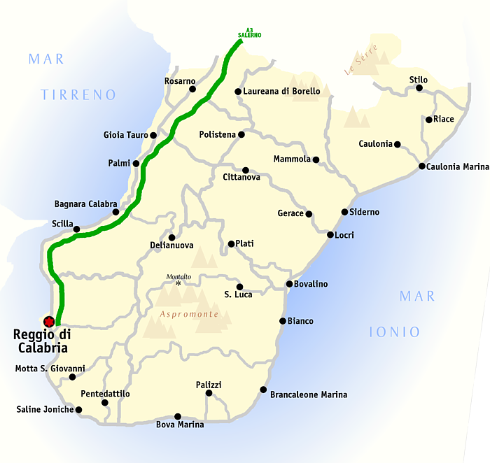 "Province of Reggio Calabria" Map